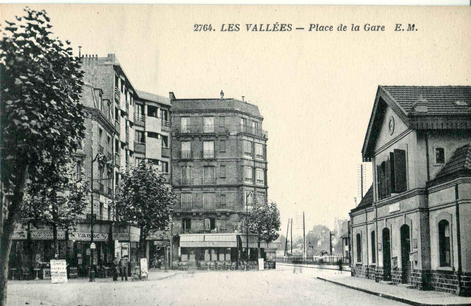 Carte postale ancienne éditée par EM, n°2764 : LES VALLÉES - Place de la Gare